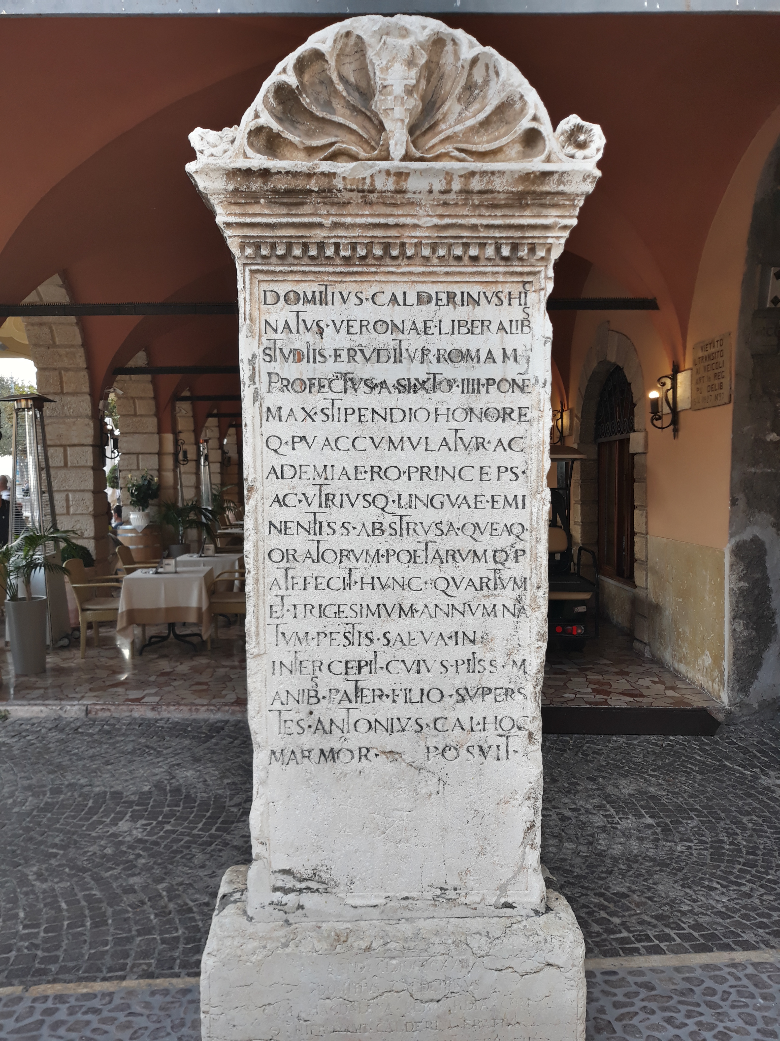 Iscrizione dedicata all'umanista del XV secolo Domizio Calderini a Torri del Benaco (provincia di Verona)